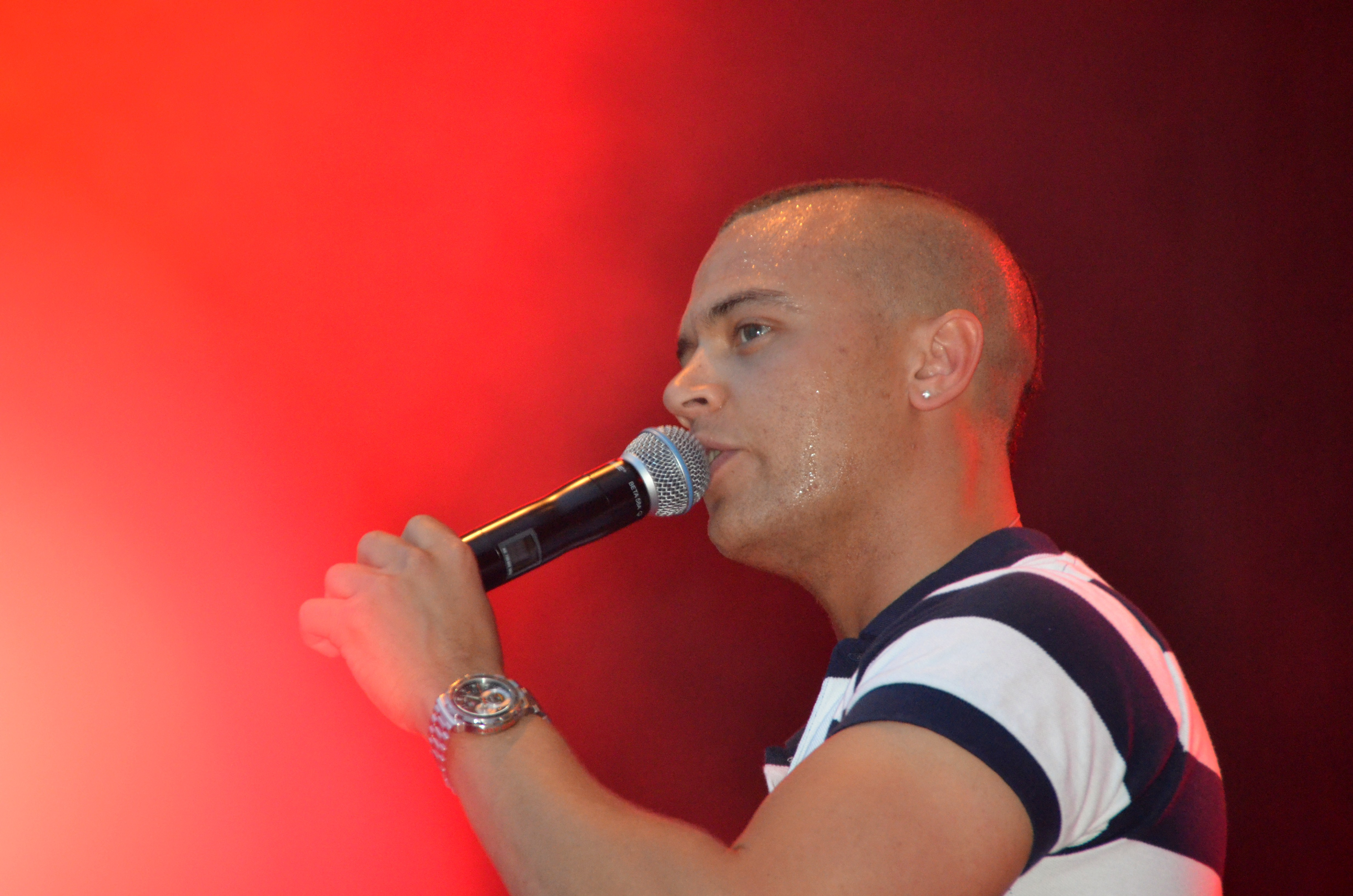 Kristoffer Tømmerbakke fra Erik og Kriss under en konsert i Langesund i juli 2011.